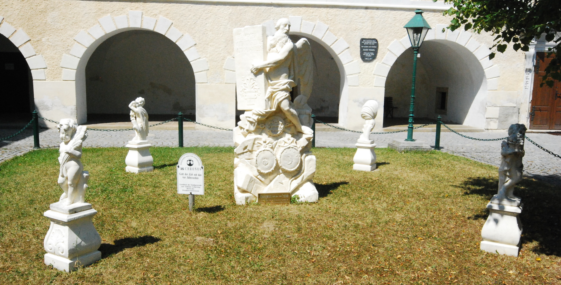 Chronos-Fragment im Hof des Pöltingerhofs in Pulkau in Niederösterreich